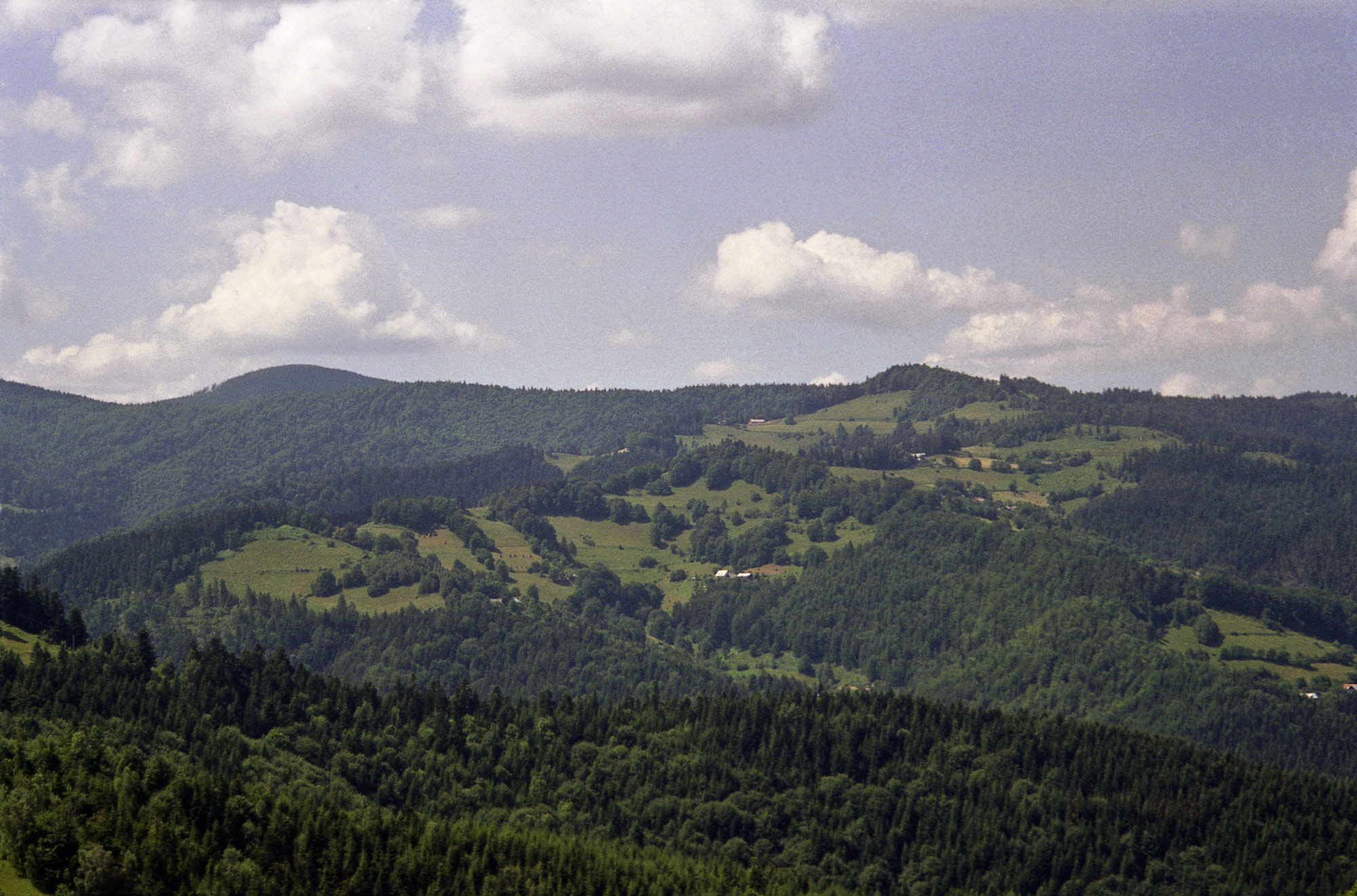 Widok na Niemcową (po prawej) z zielonego szlaku w okolicach Eliaszówki. Po lewej w głębi - Radziejowa